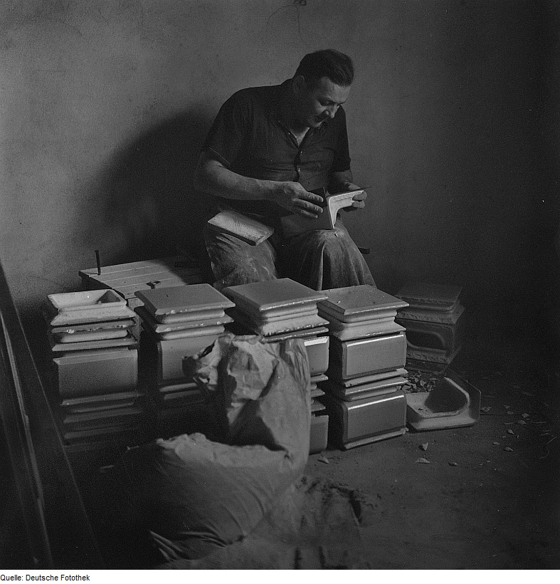 Original image description from the Deutsche Fotothek Ofensetzer beim Schleifen von Kacheln